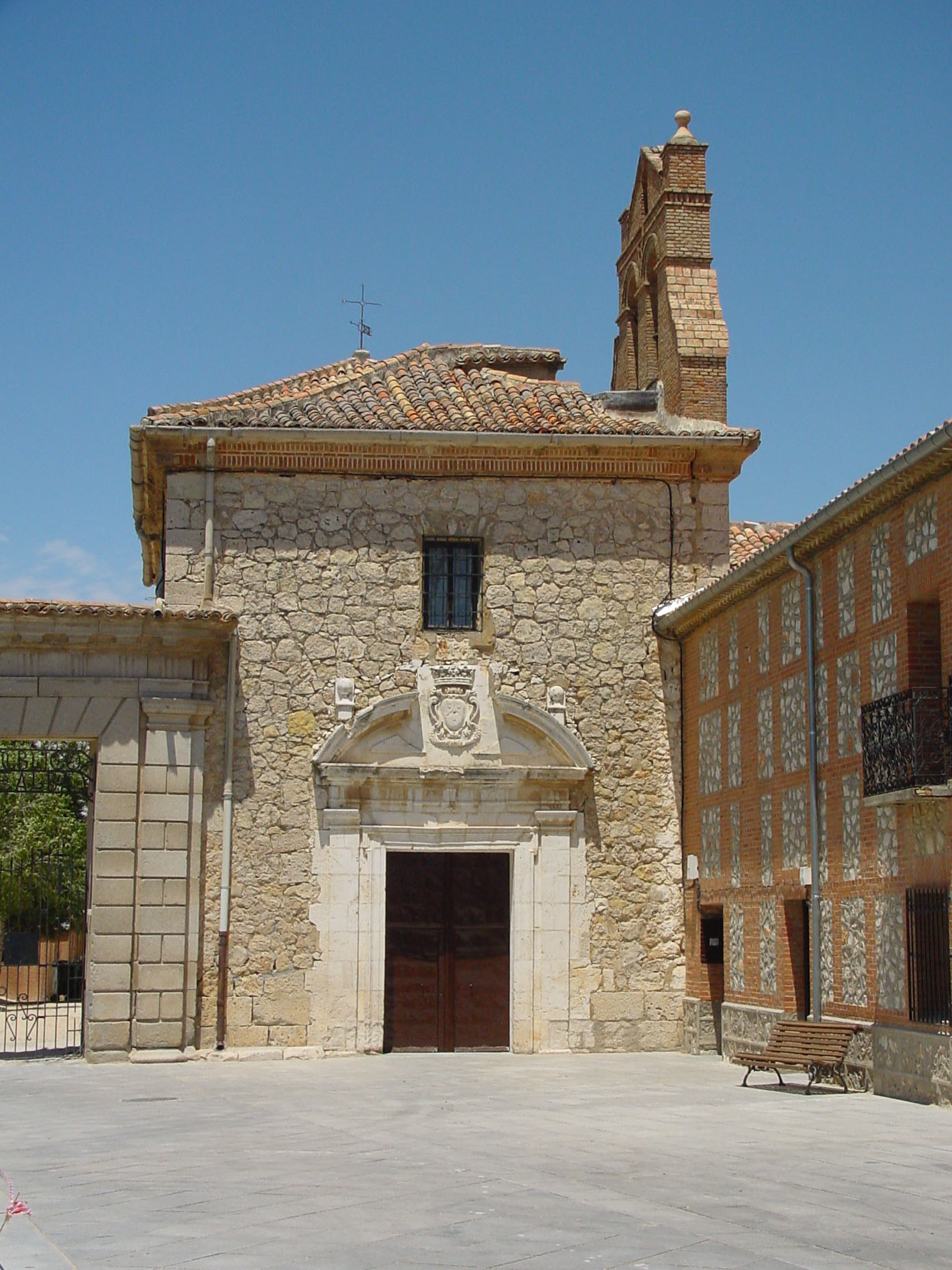 Monasterio de San Ignacio Mártir de Loeches.